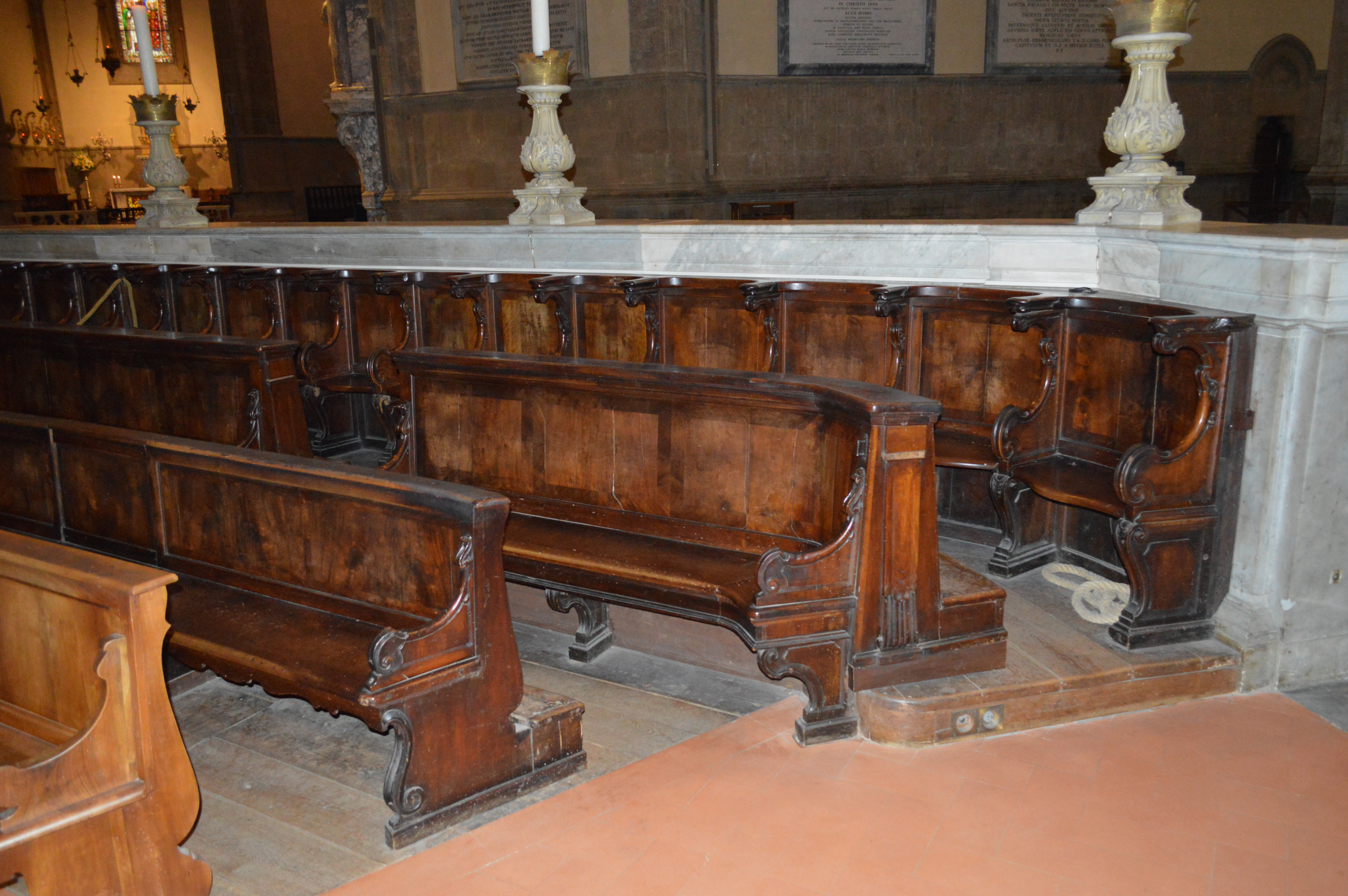 Particolare degli stalli lignei di destra.